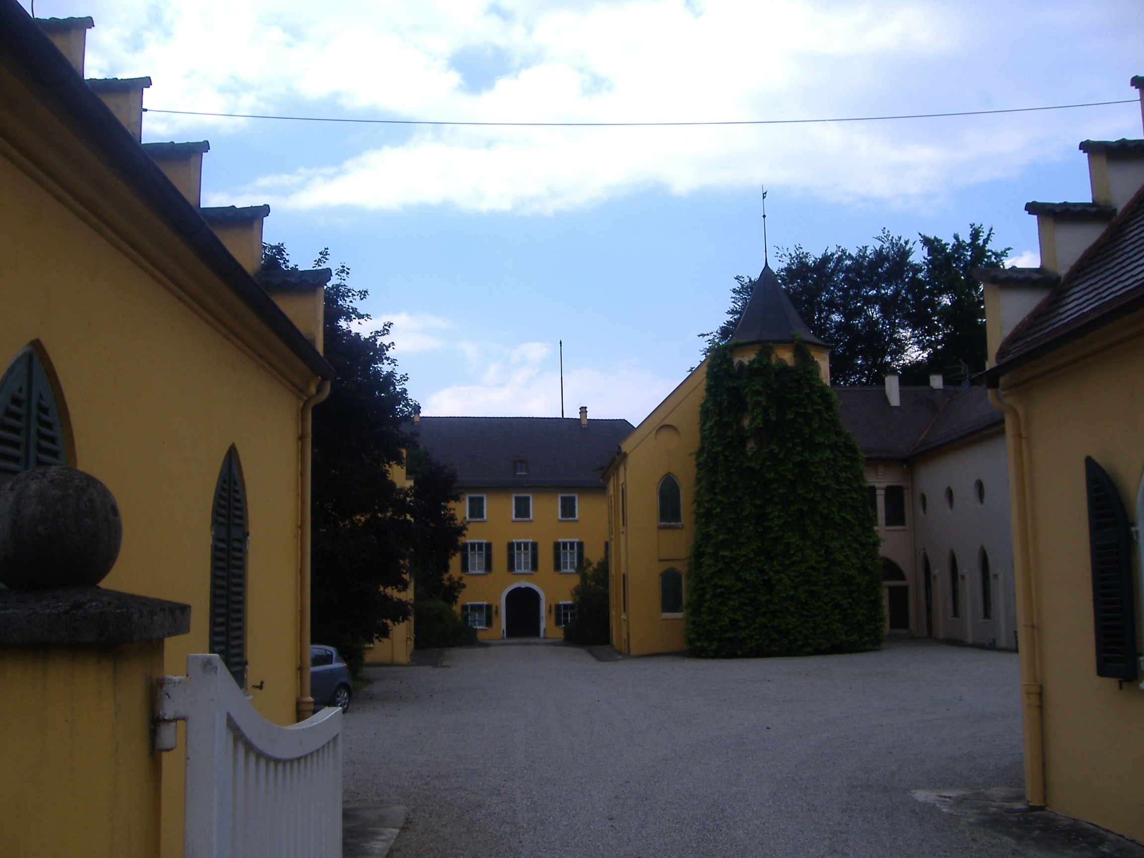 Innenhof des Schlosses Seyfriedsberg